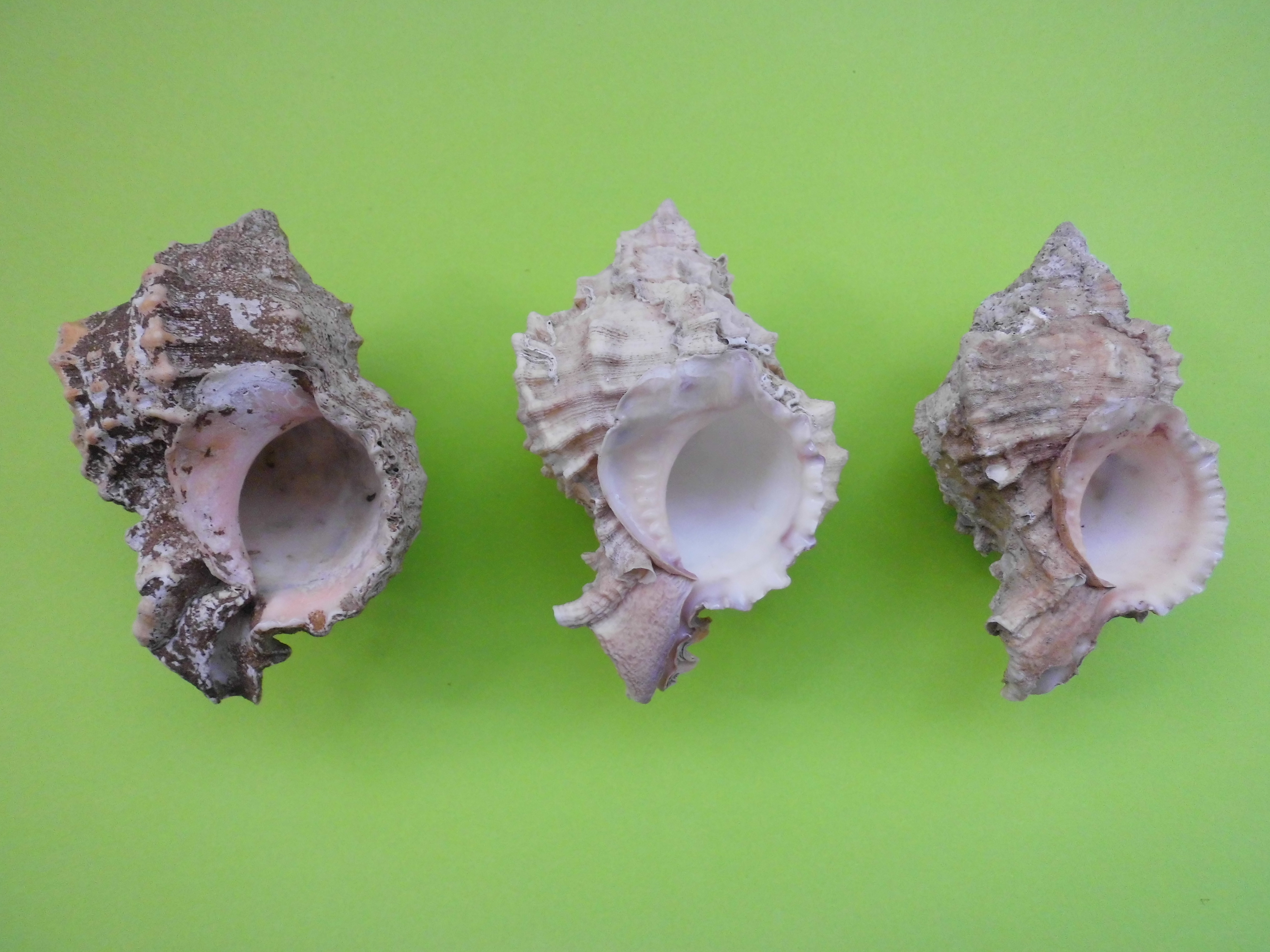 Phyllonotus margaritensis (Abbott, 1958) colectados en el 2002 en Puerto Real Archipiélago Los Frailes, Dependencias Federales - Venezuela